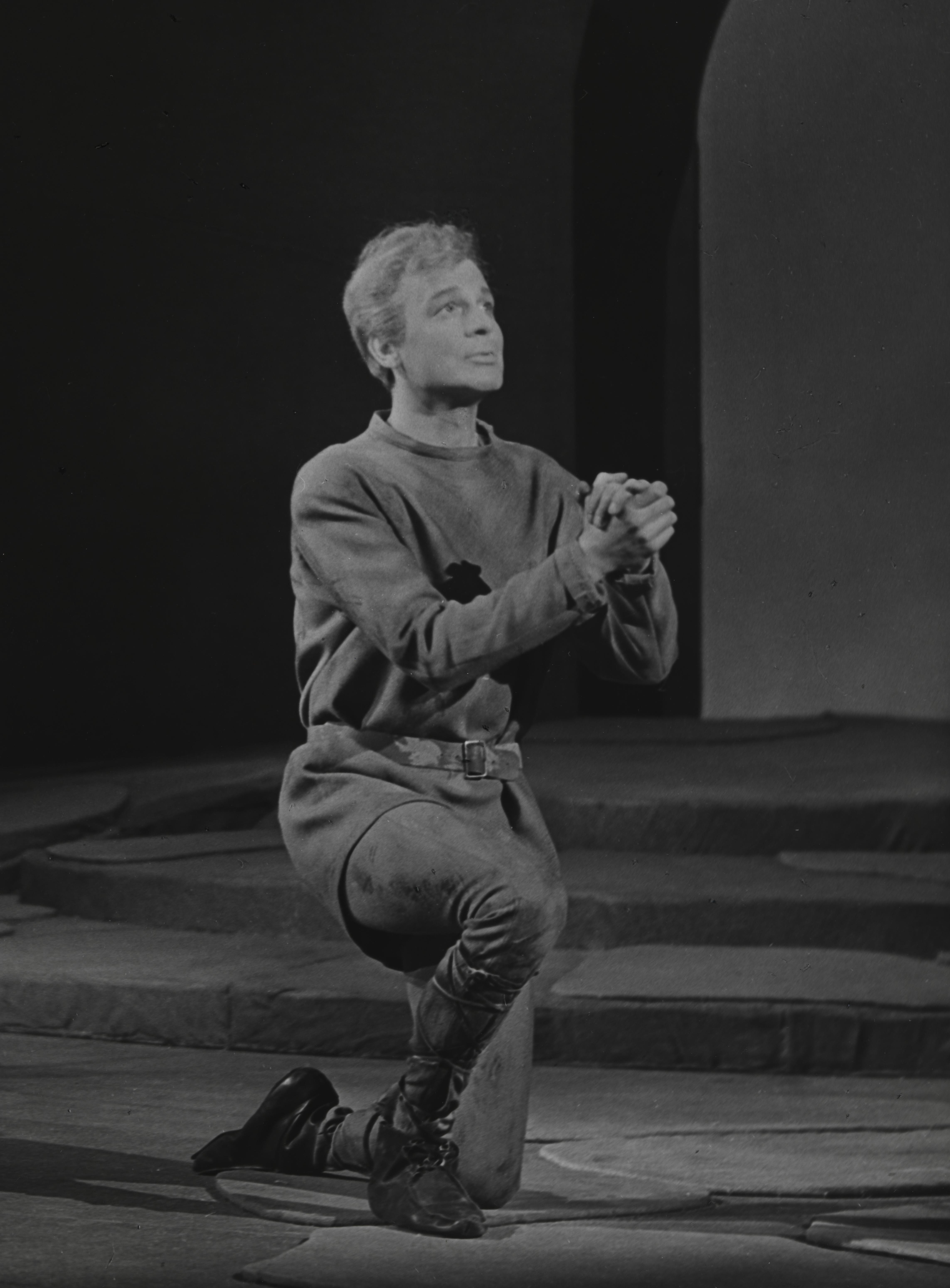 Bildet er hentet fra Nasjonalbibliotekets bildesamling Depicted person: Sunderland, Per